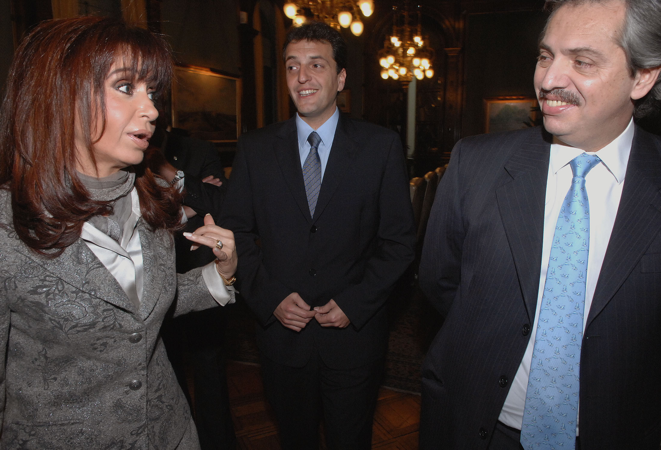 La Presidenta, el nuevo jefe de gabinete, Sergio Massa, y el jefe de gabinete saliente, Alberto Fernández.